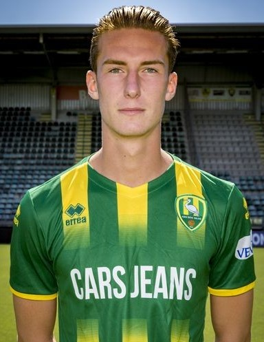 Dennis van der Heijden